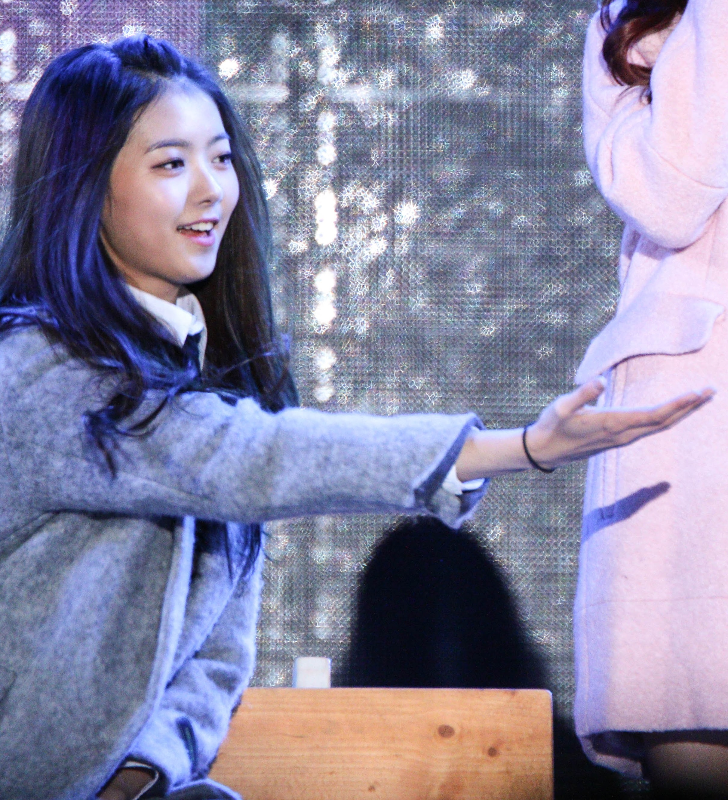 141211 더쇼 in 코엑스 야외무대